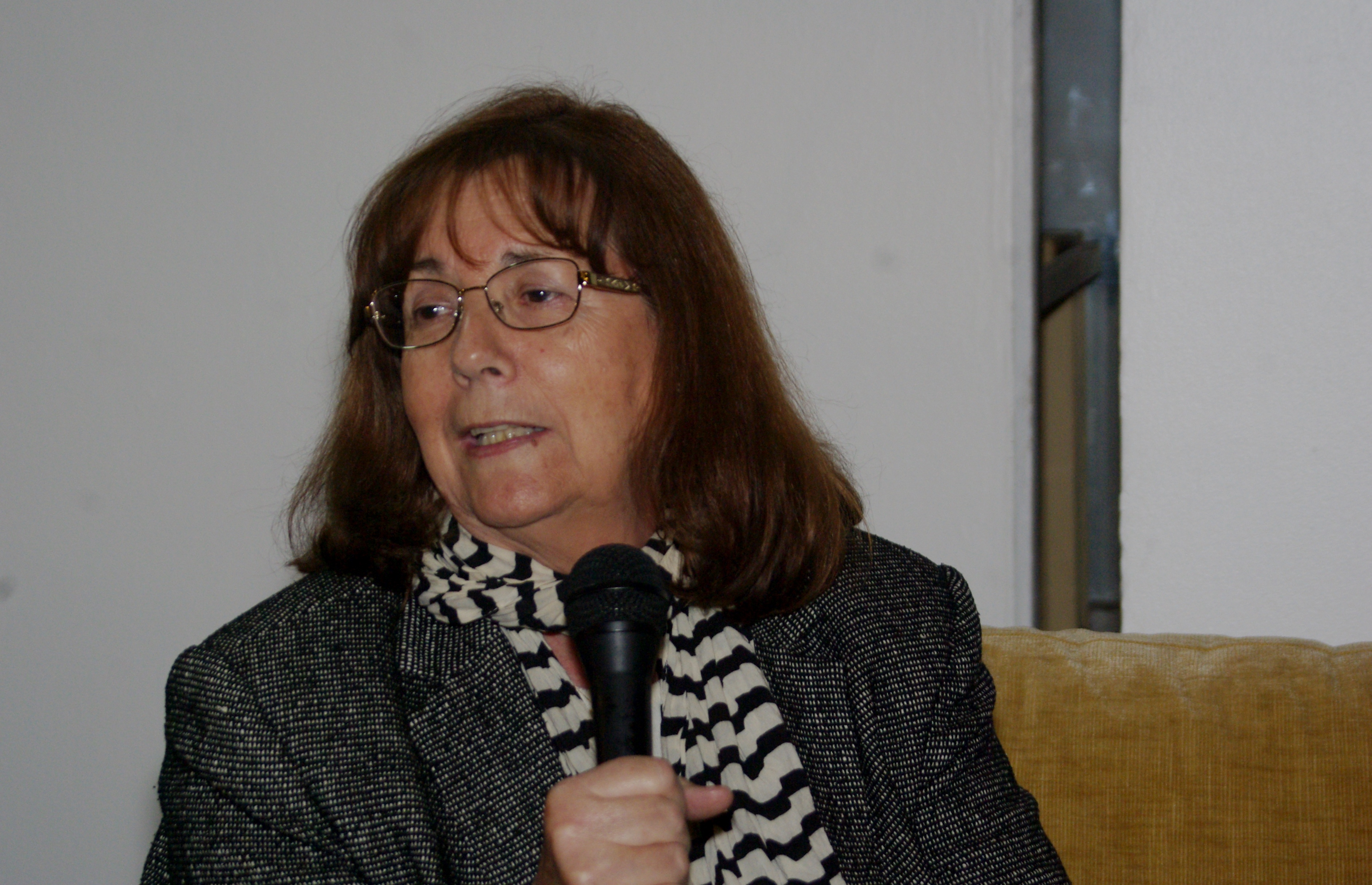 La astrónoma chilena María Teresa Ruiz en la Feria Internacional del Libro de Santiago 2015